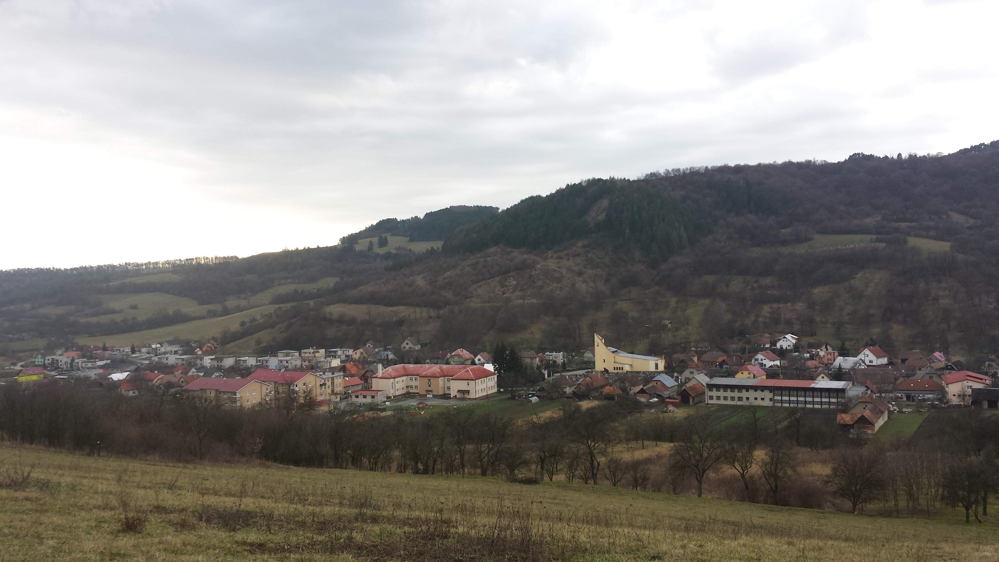 Pohľad na školu, kostol a kultúrny dom